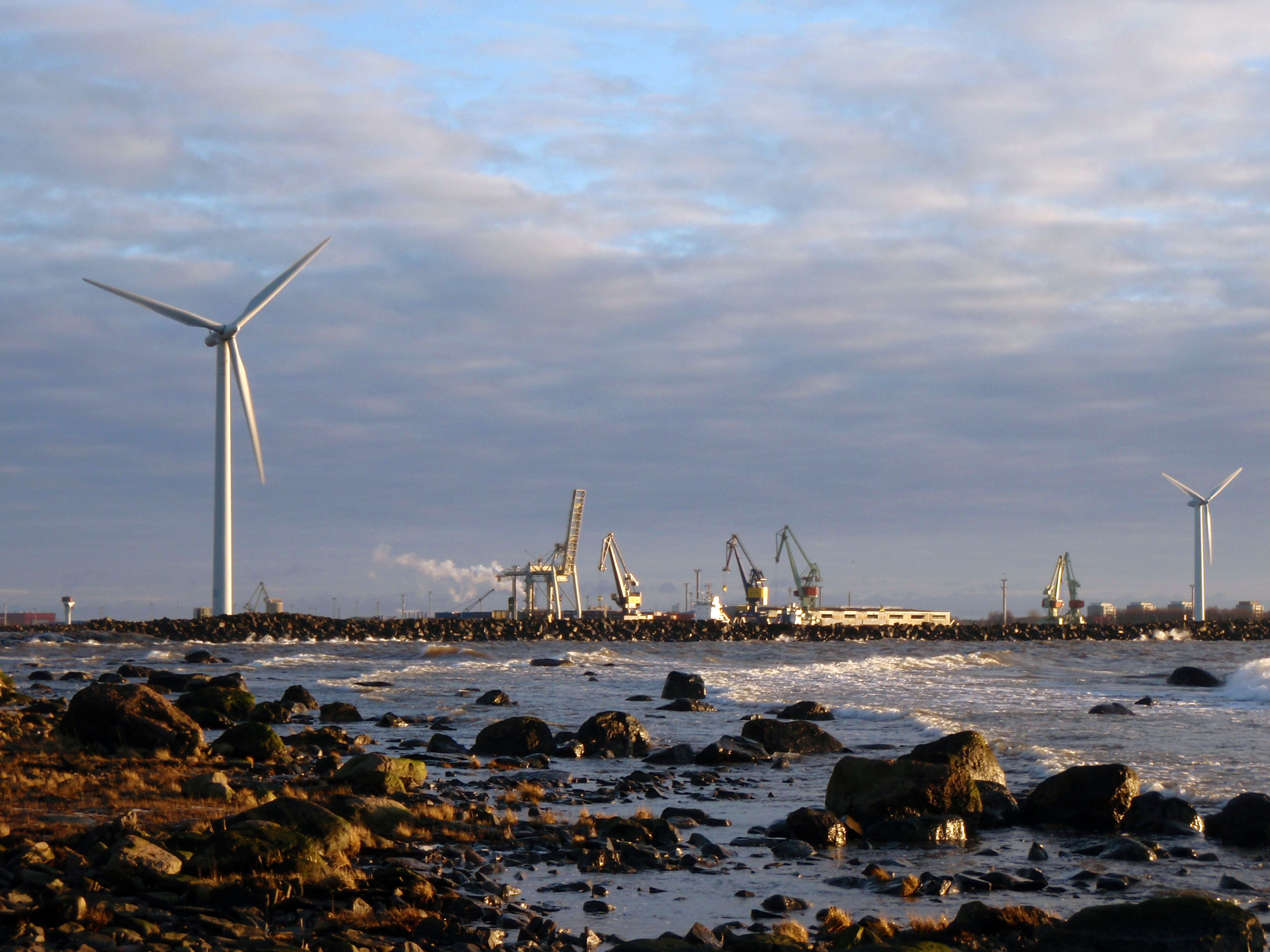 Kuva Reposaaren Linnakepuiston rannalta. Kuvassa näkyy Linnakepuiston rantaa, Reposaaren aallonmurtaja, kaksi tuulivoimalaa (jotka sijaitsevat aallonmurtajan päällä) sekä taustalla Mäntyluodon satamaa.